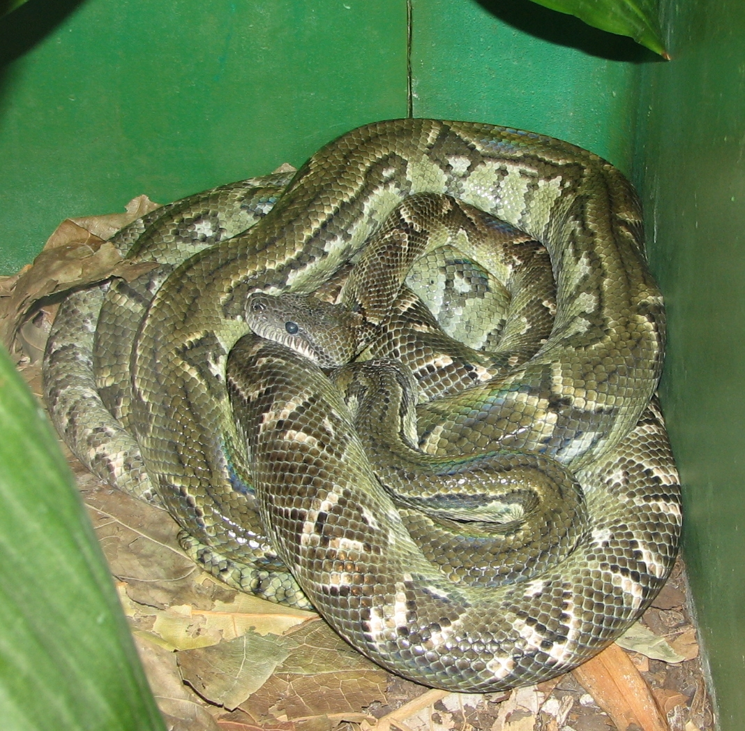 Madagascar Tree Boa - Sanzinia madagascariensis